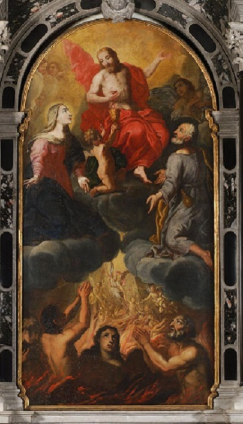 "Le anime del Purgatorio invocano il cuore di Gesù", olio su tela, 210 x 120 cm, chiesa del Friuli